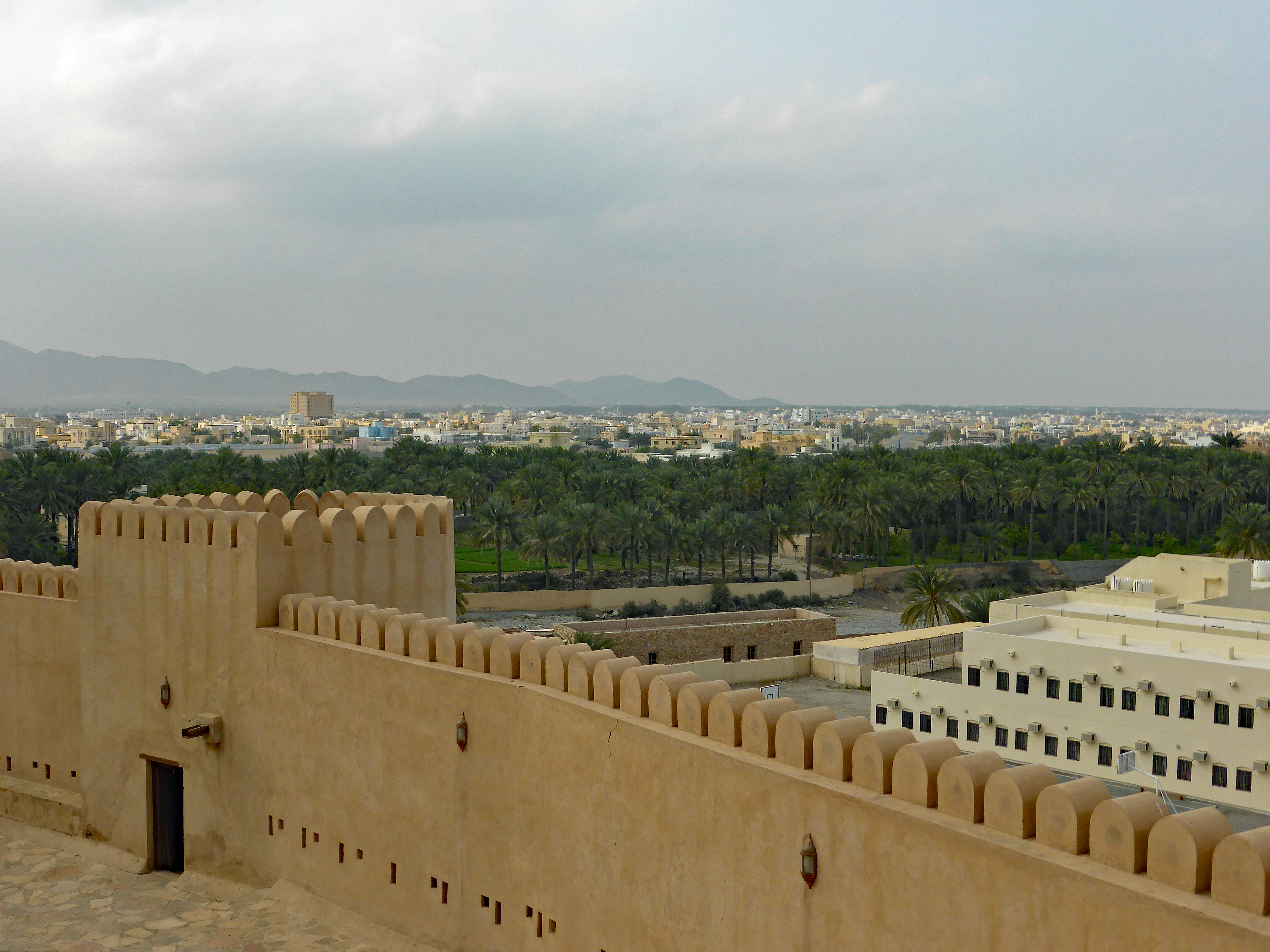 Rustaq, Oman.